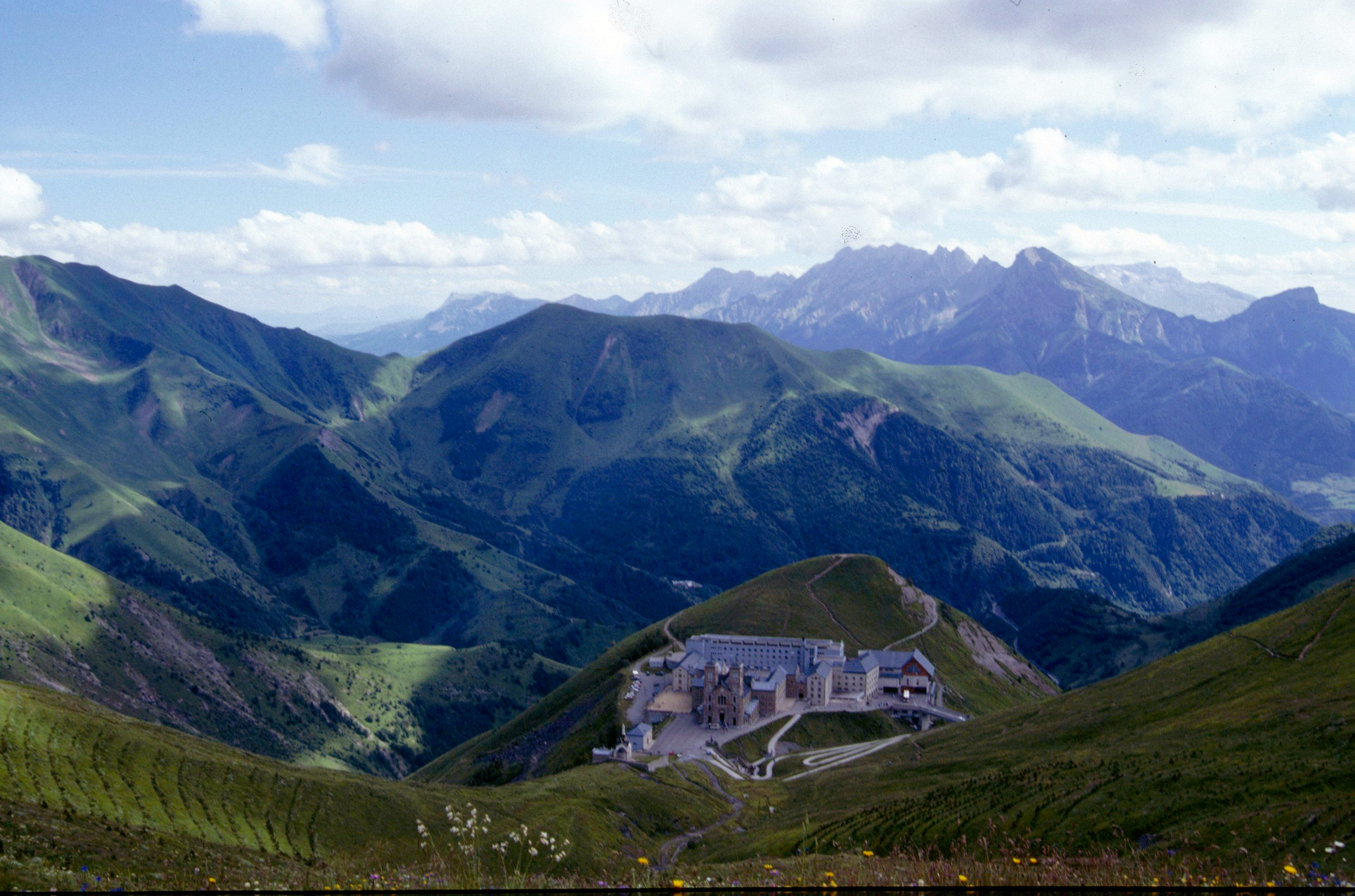 Nôtre Dame de la Salette